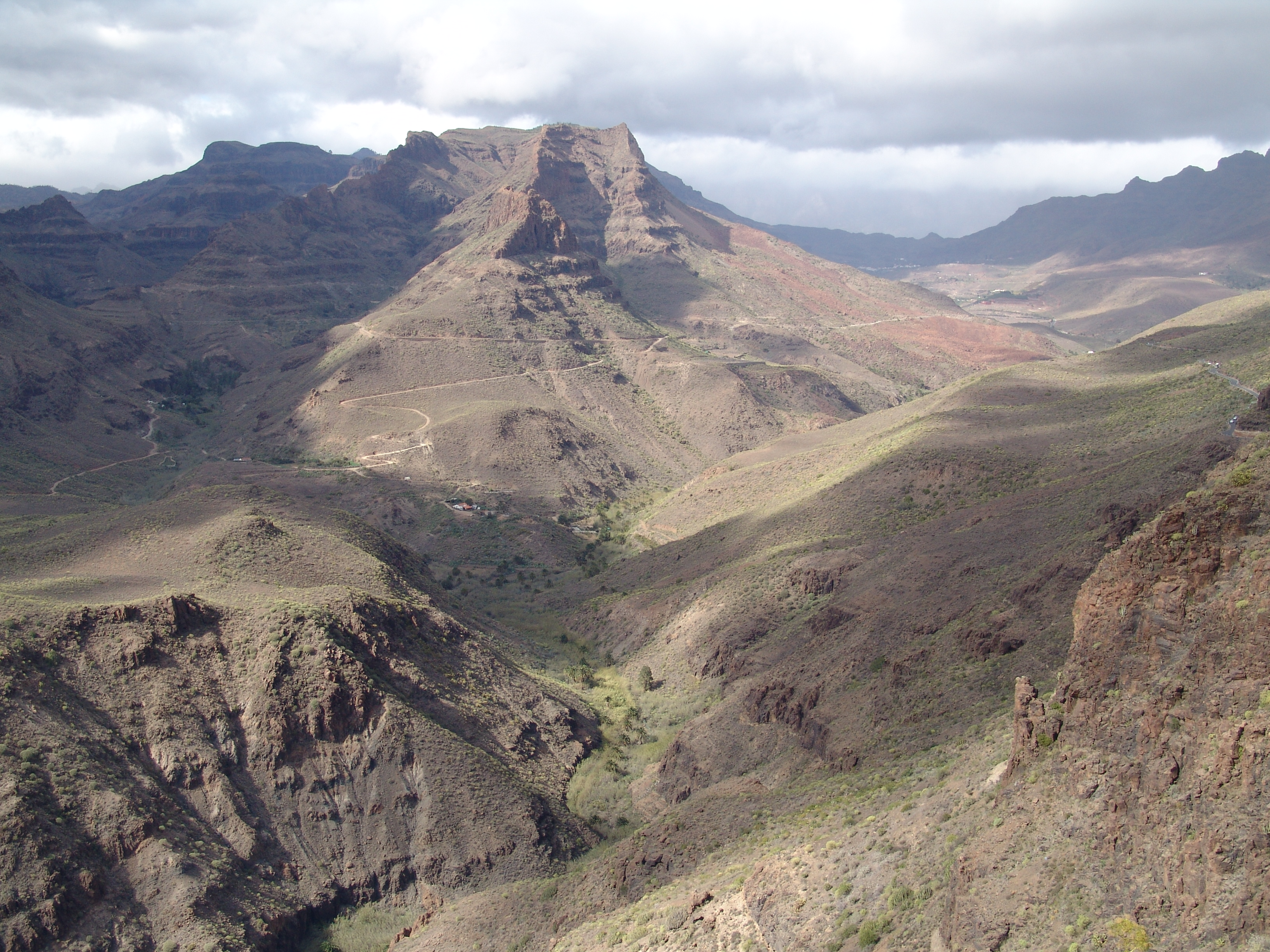 Bergwelt Gran Canarias